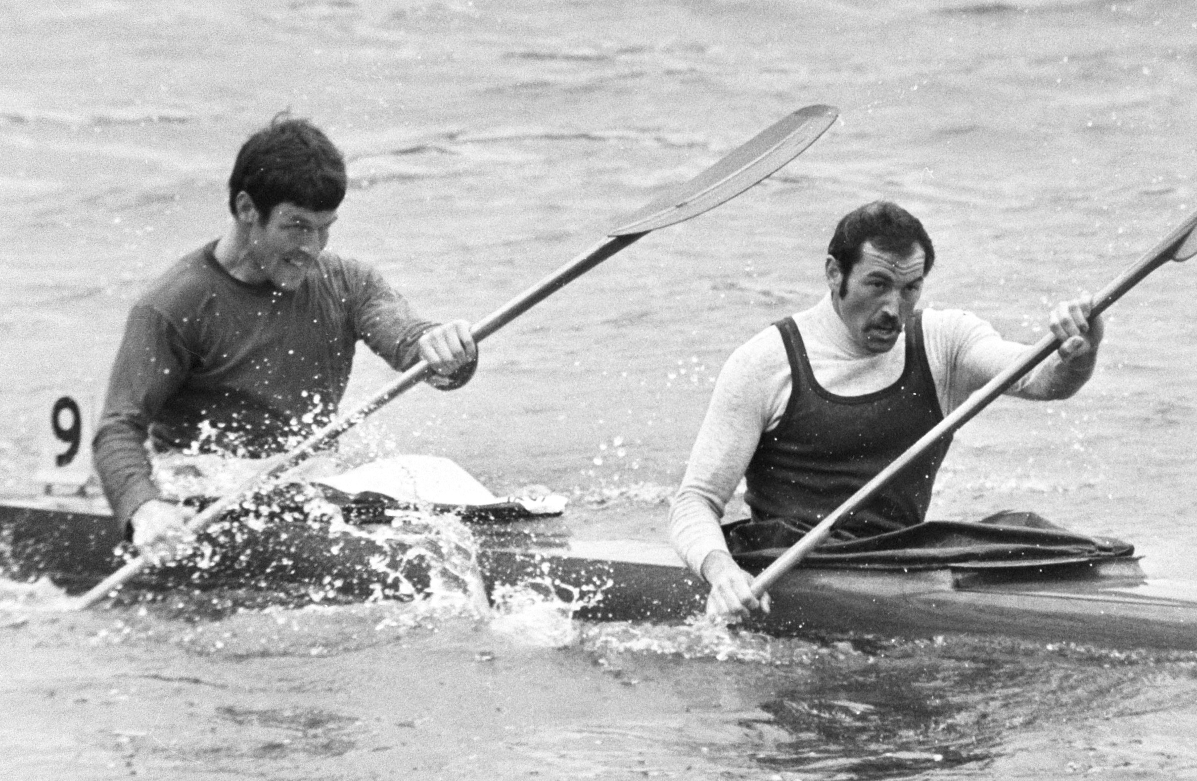 Internationale kanowedstrijden op de Bosbaan in Amsterdam. Belgisch duo Hoekstra (links) en Burny (rechts) in actie